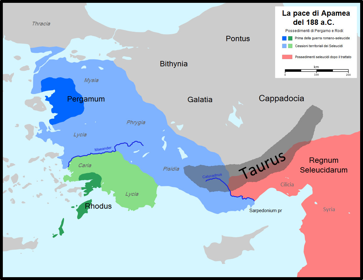 Versione italiana di File:Treaty of Apamea.png.